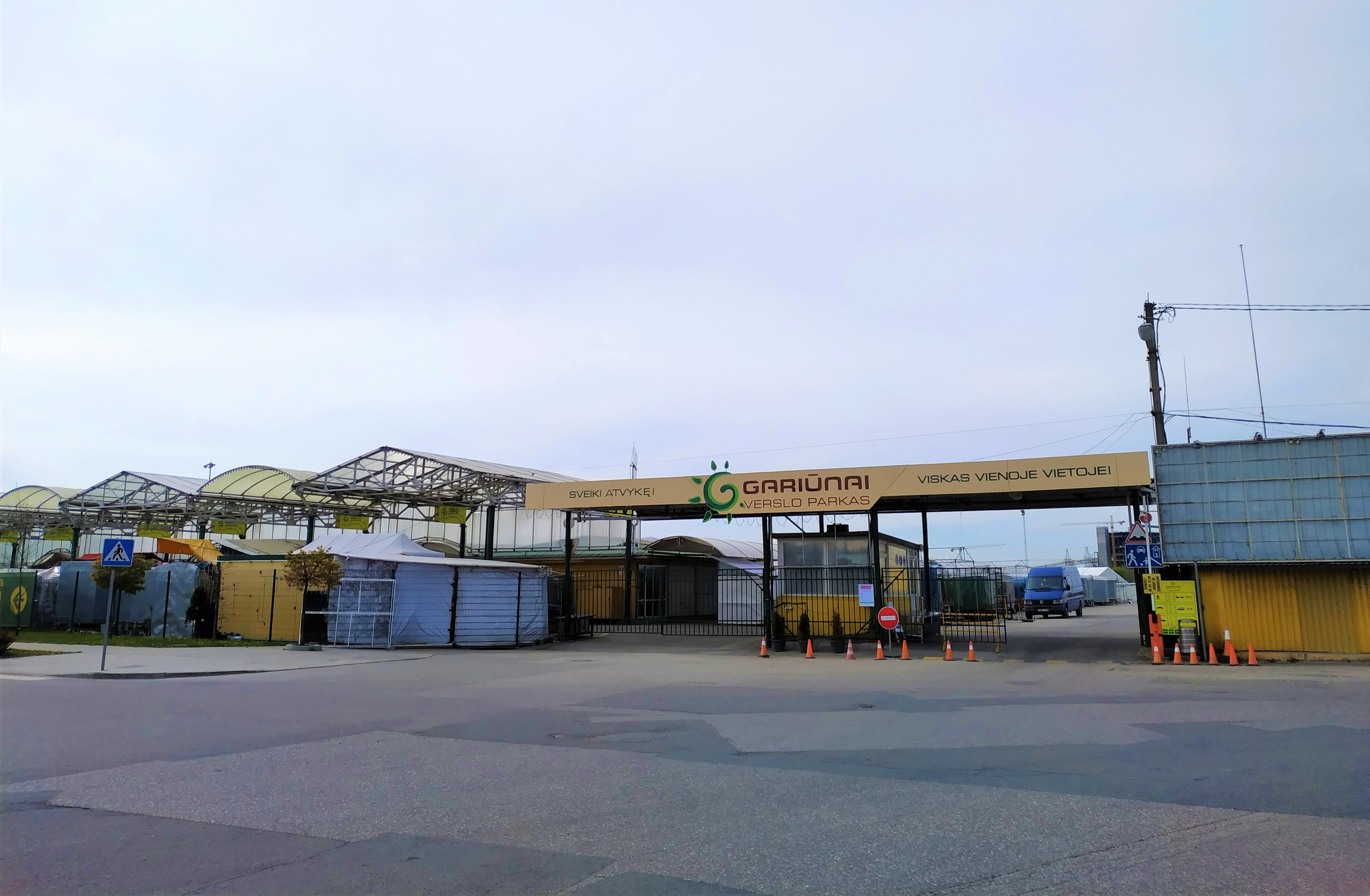 Komentaras